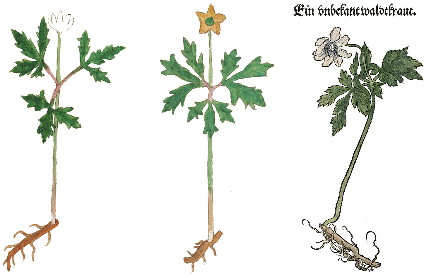 Abbildung von Anemone nemorosa und Anemone ranunculoides